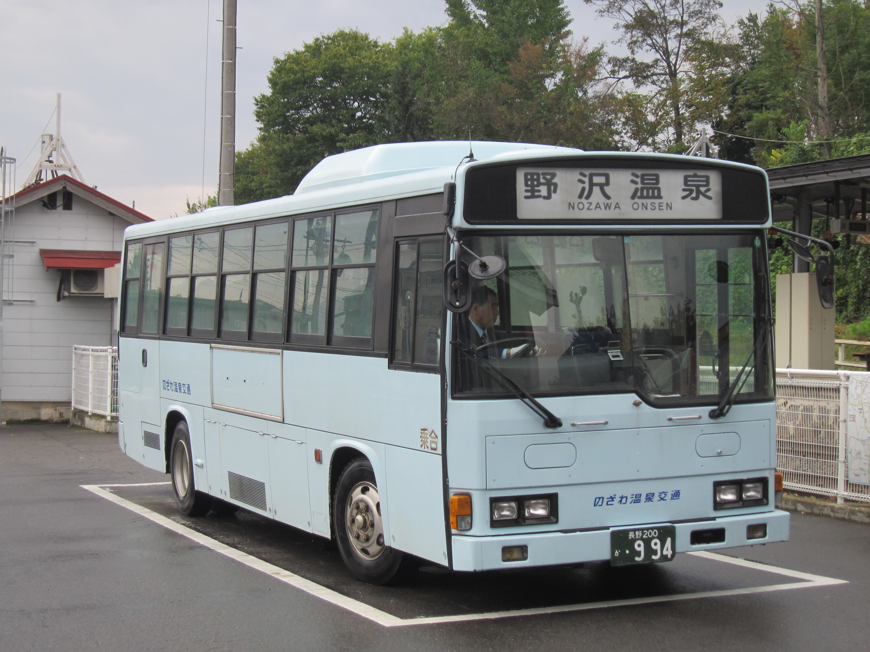 のざわ温泉交通の乗り合いバス（戸狩野沢温泉駅前撮影）